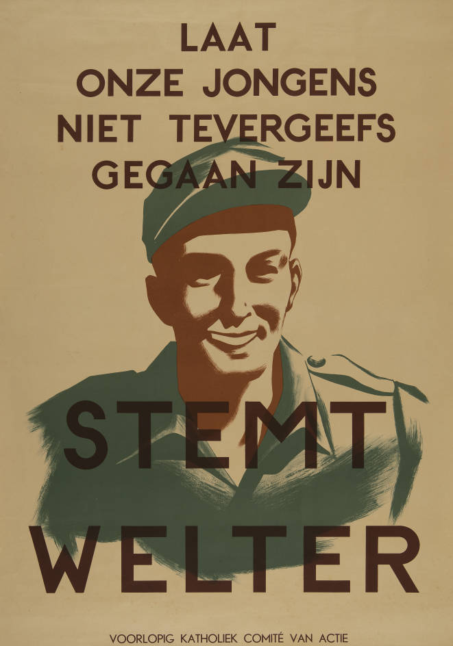 Partij Lijst Welter/Partijnaam alternatief Voorlopig Katholiek Comité van Actie/Functie Tweede Kamerverkiezingen/Jaar 1948/Datum verkiezingen 07-07-1948/Lijsttrekker afgebeeld/genoemd Charles Welter/Tekst Laat onze jongens niet te ver gegaan zijn - Stemt Welter - Voorlopig Katholiek Comité van Actie